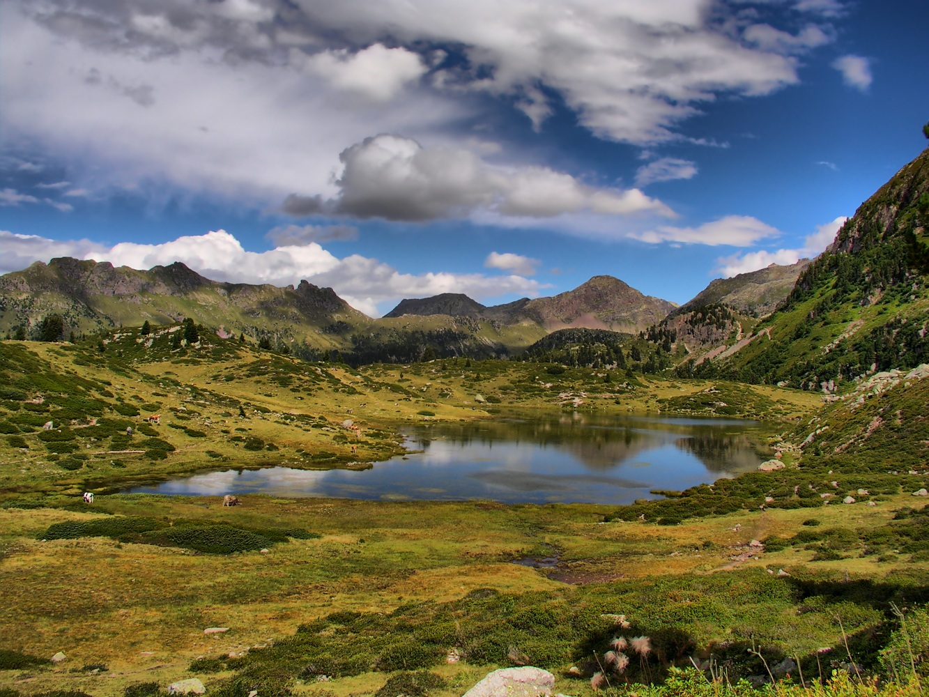 Lago delle Buse